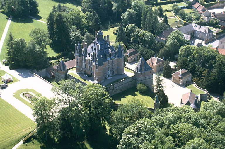 Vue aérienne du château de Montmort